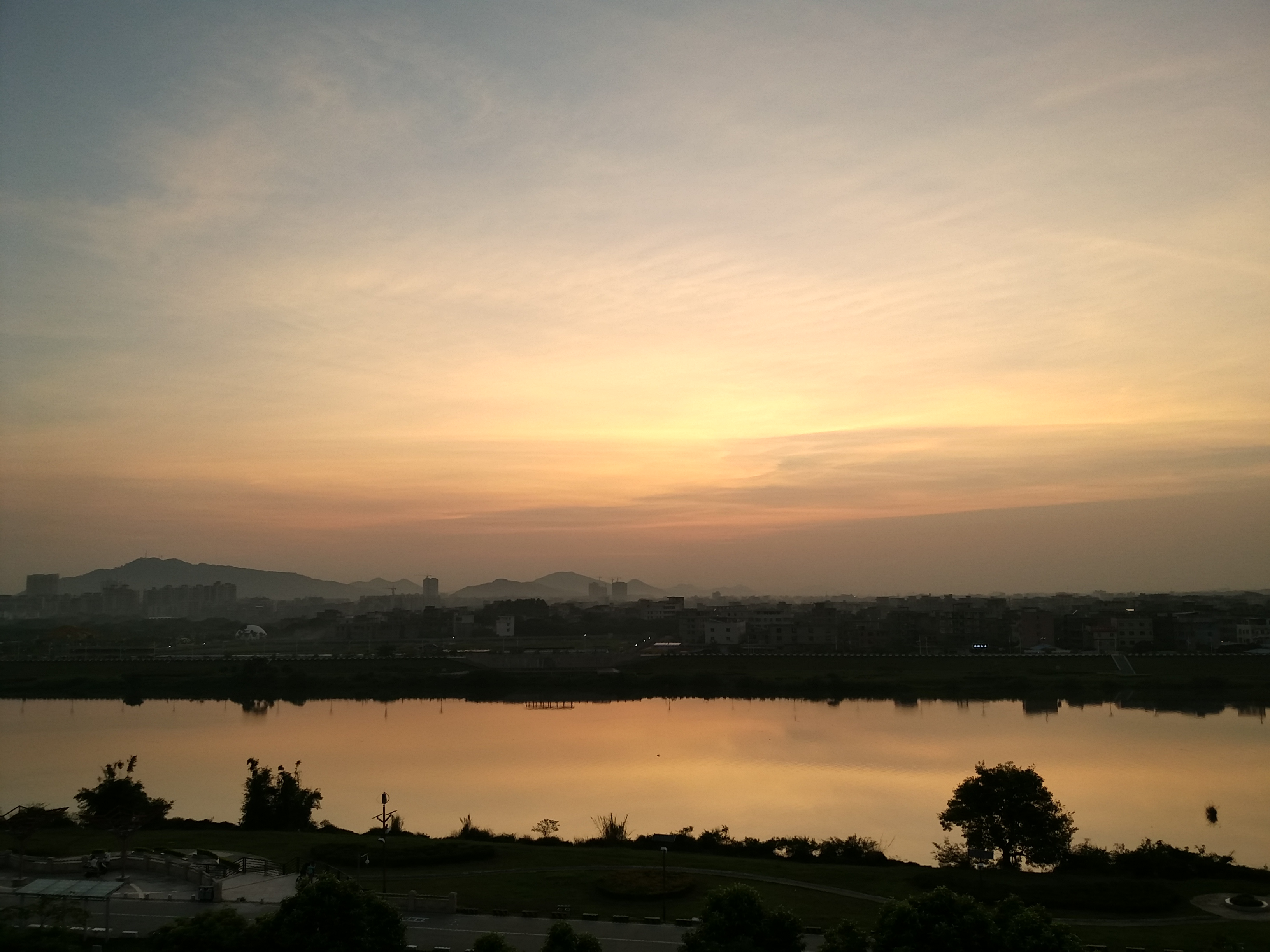 中文（中国大陆）: 夕阳下的流溪河